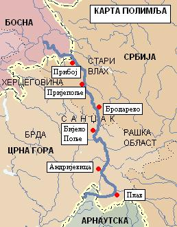 Карта Полимља